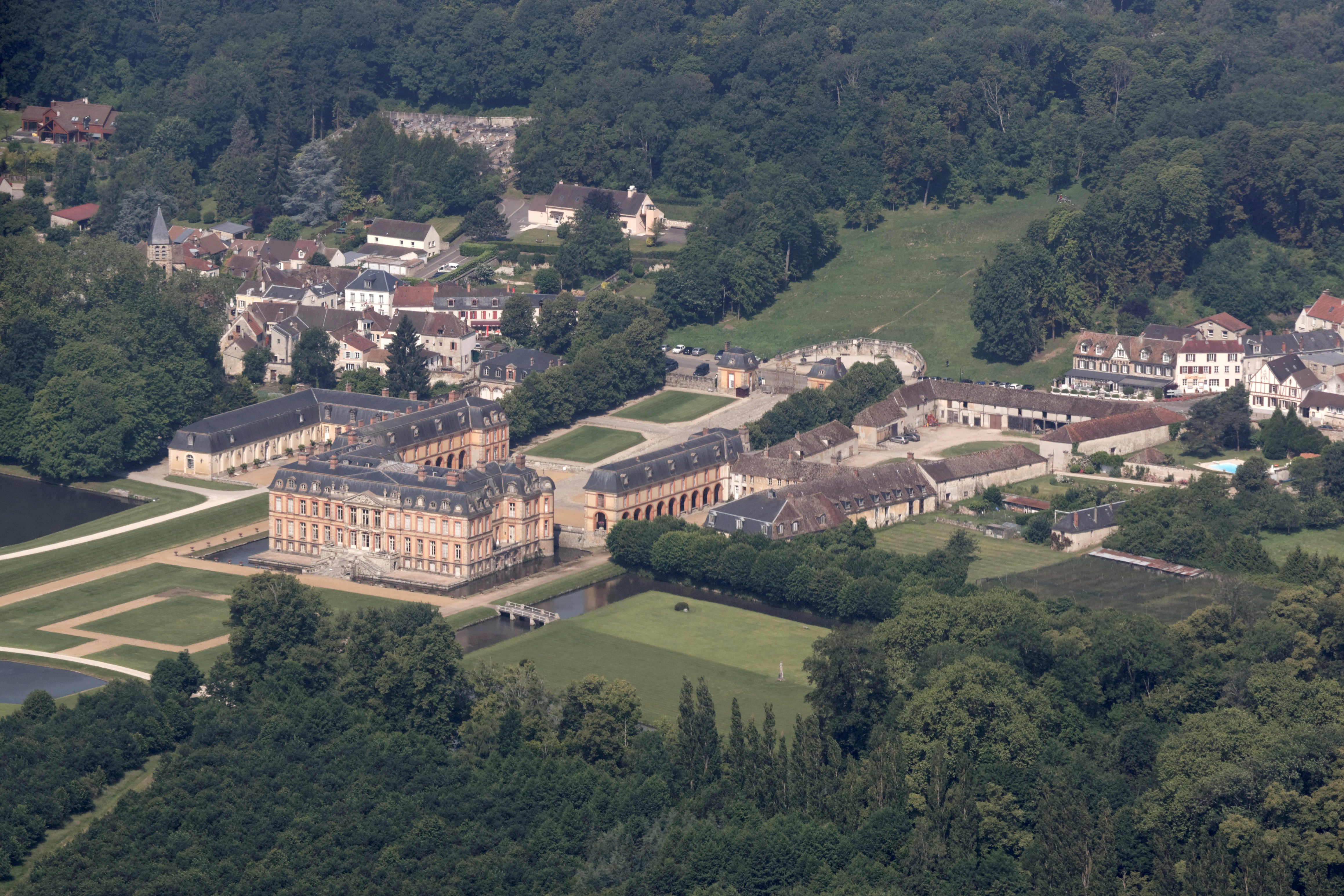 Château de Dampierre, Dampierre-en-Yvelines, France.